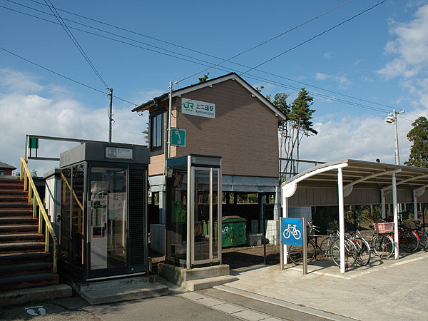 Kamifutada Station, on the JR Oga Line, Katagami, Akita, Japan